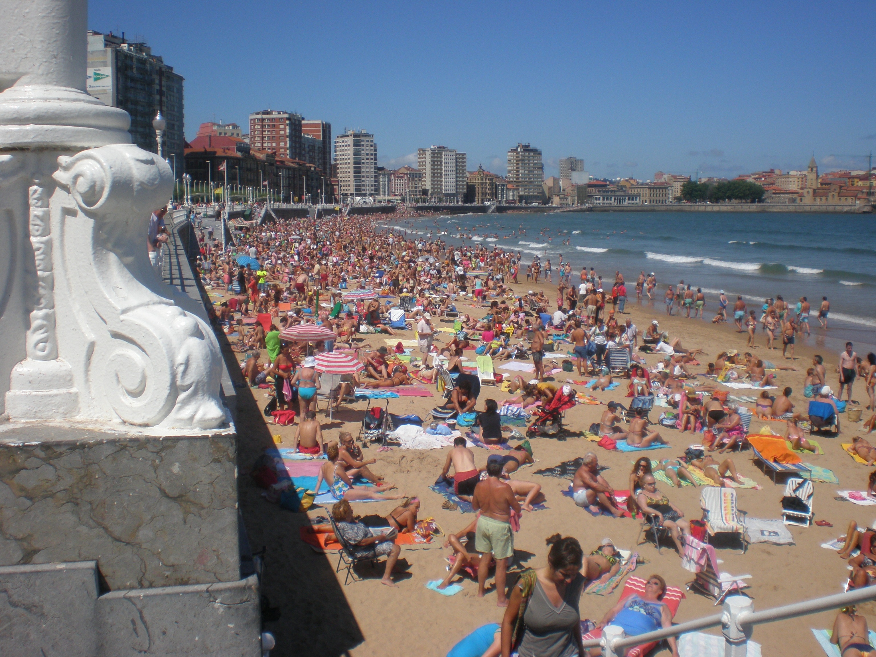 quien da la vez?